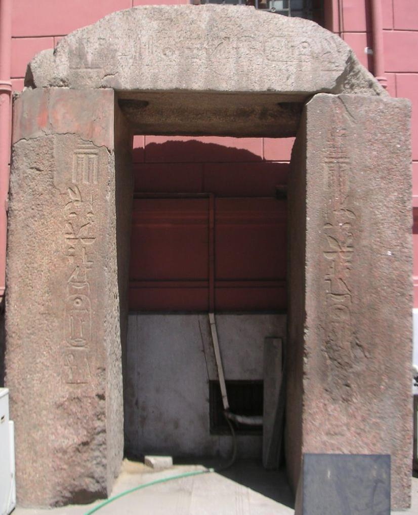 Porte en granite rouge de Niouserrê trouvée dans le temple de Ptah à Memphis et aujourd'hui exposée au Musée du Caire - Proviendrait du temple solaire du roi à Abou Ghorab puis réutilisée ultérieurement dans le temple memphite - Ve dynastie égptienne